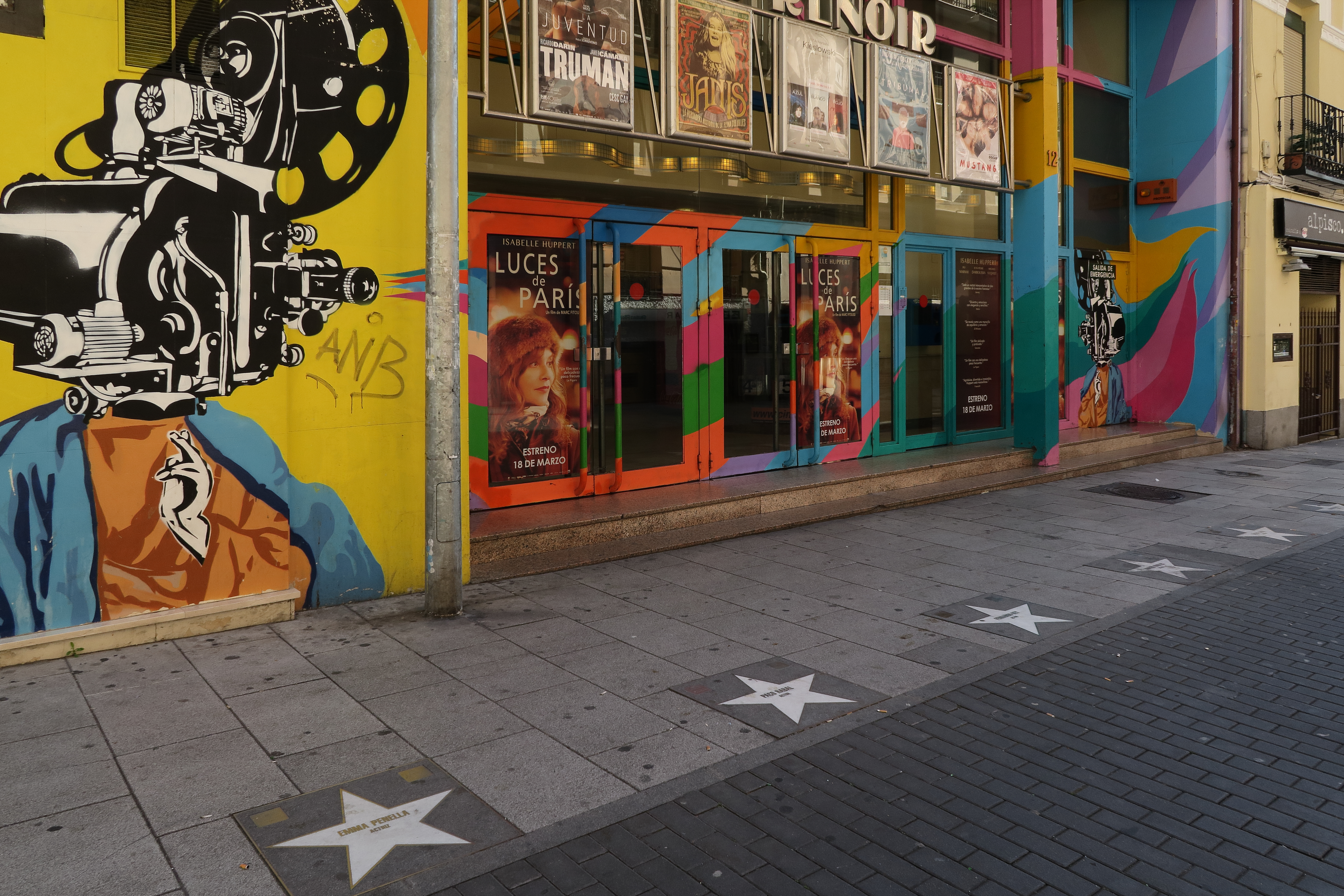 Paseo de la fama de Madrid, estrellas junto a los cines Renoir